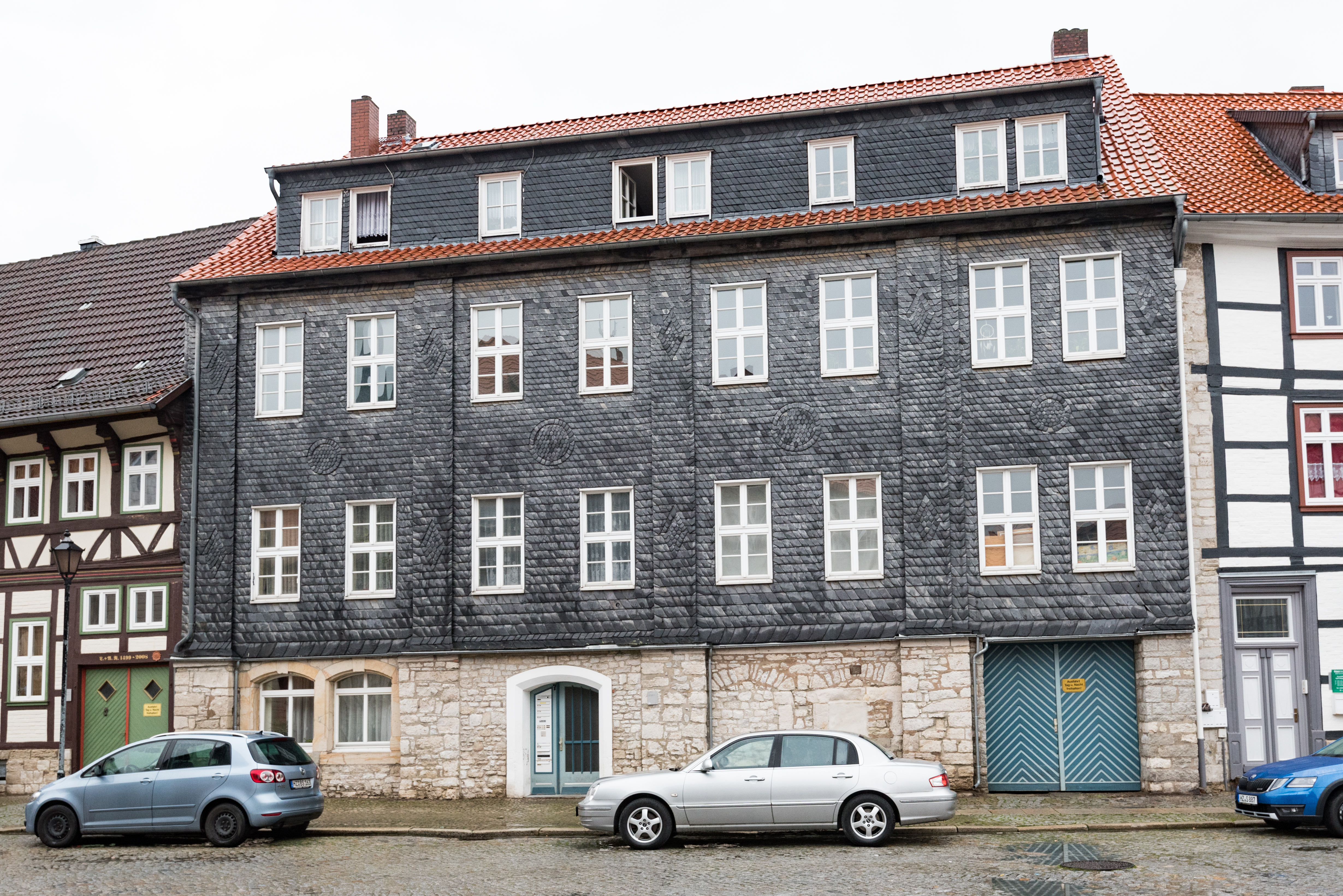 Osterwieck, Am Markt 7